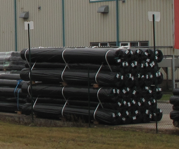 Závody 14 a 15 firmy JUTA a.s. ve Dvoře Králové nad Labem. Okres Trutnov, Česká republika.